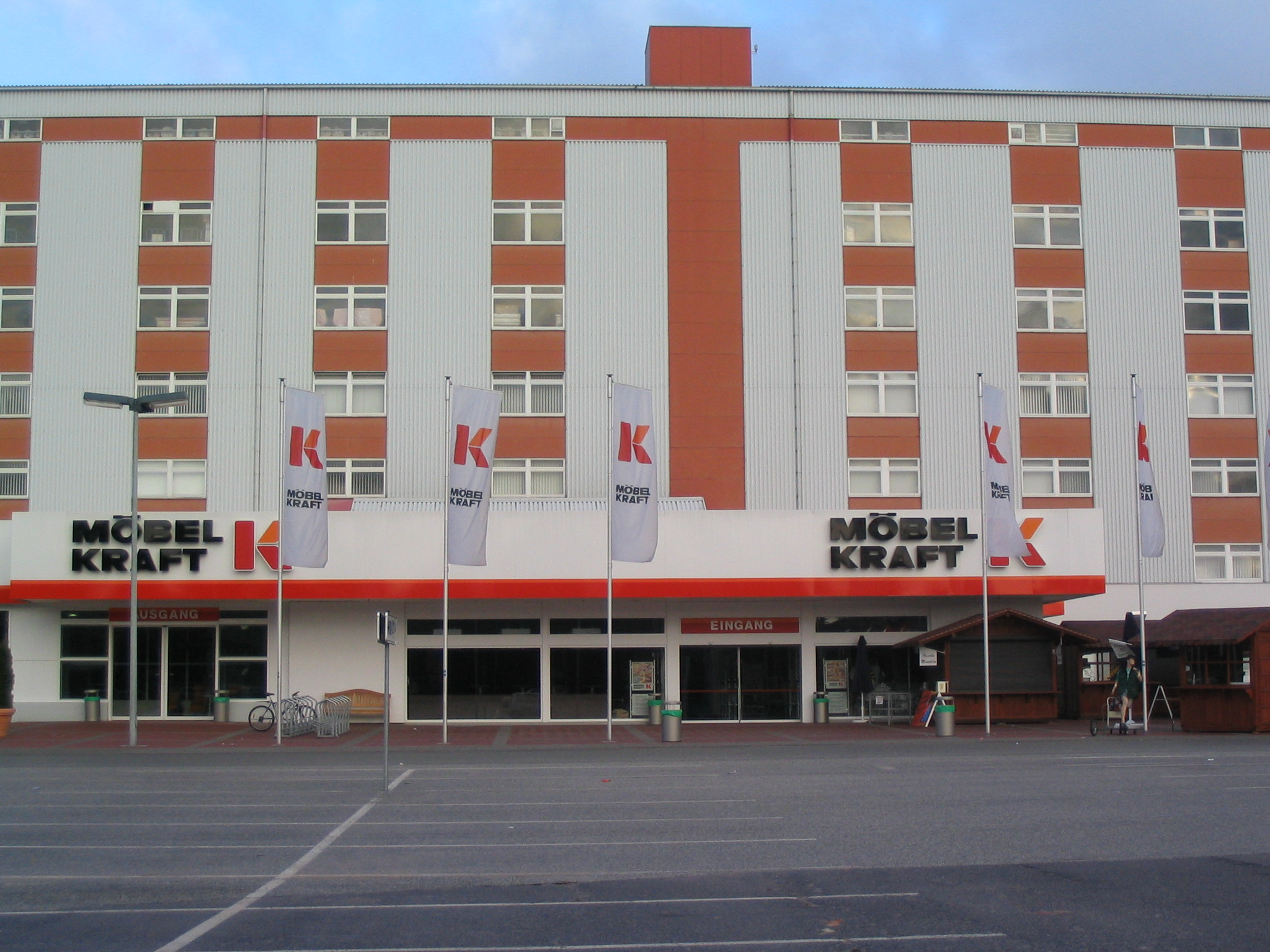 Möbel Kraft in Bad Segeberg (unsual empty because it's sunday)